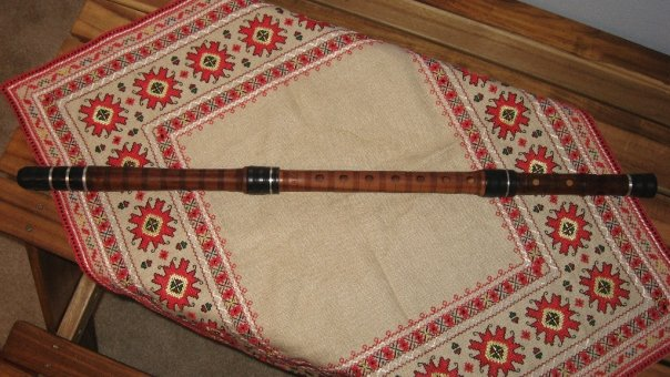 Български триставен Кавал в До строй, изработен от Дрян през 2009